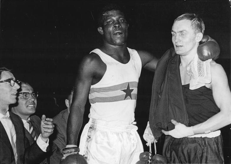 Popoola, Schneider Zentralbild Semeniuk 21.9.1962 Boxvergleich zwischen SC Rotation Berlin und einer ghanesischen Auswahl Am 20.9.1962 veranstaltete der SC Rotation Berlin einen Boxabend, an dem auch 6 Kämpfe gegen ghanesische Boxer ausgetragen wurden. UBz:Der deutsche Vizemeister im Federgewicht Schneider besiegte Popoola nach Punkten. Hier verlassen beide Boxer kameradschaftlich vereint die Wettkampfstätte.